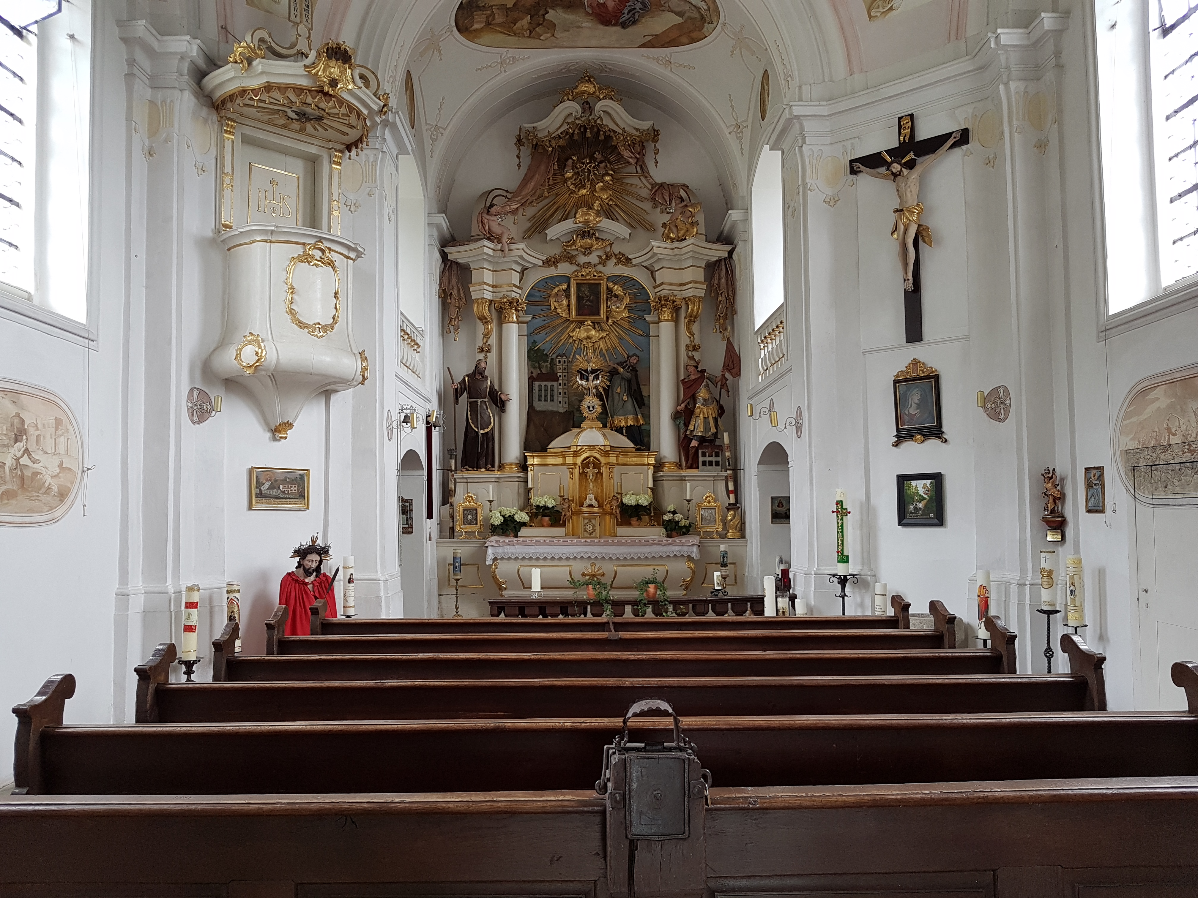 Wallfahrtskirche Schwarzlack, Innenraum mit Blick zum Chor